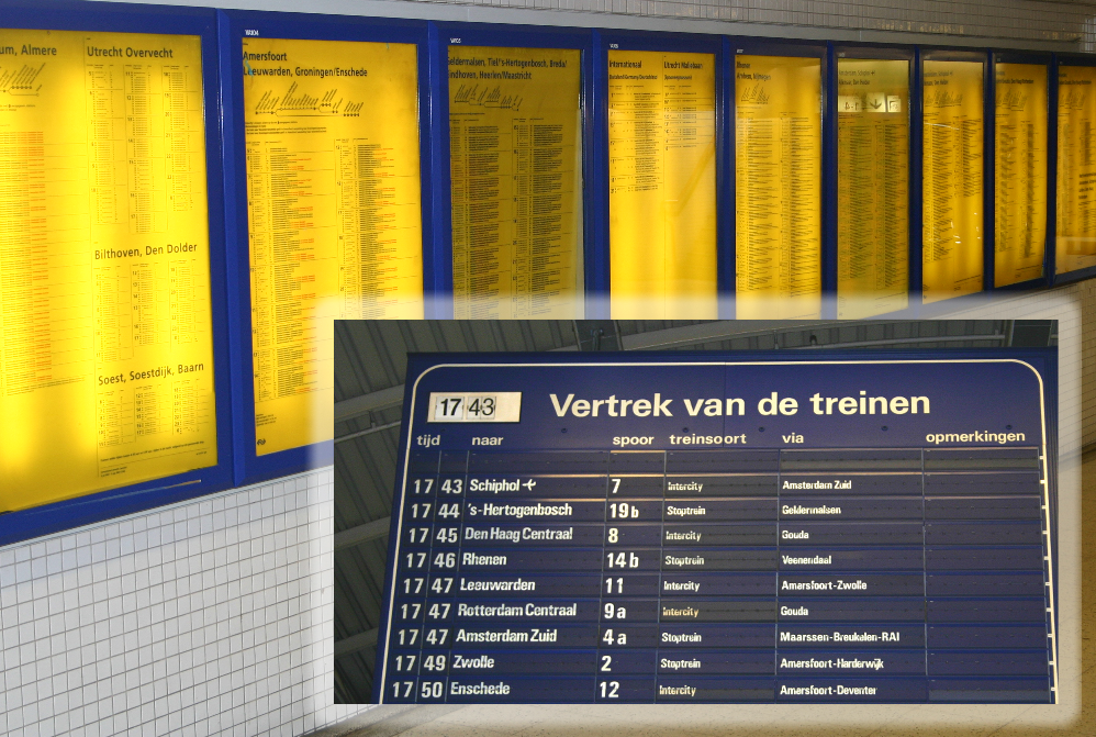 Het verschil tussen data en informatie: Data is een lijst met ruwe gegevens. Informatie is een selectie daarvan, afgestemd op het doel, de persoon of - in dit geval - het tijdstip.